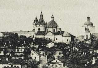 Вид на костел від півдня. Фрагмент поштівки.